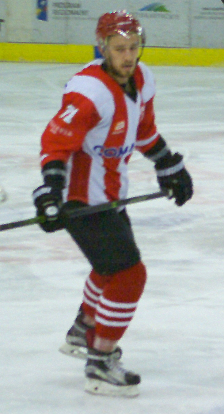 Patrik Svitana w barwach Cracovii w meczu przeciw STS Sanok (Arena Sanok, 17 stycznia 2016)